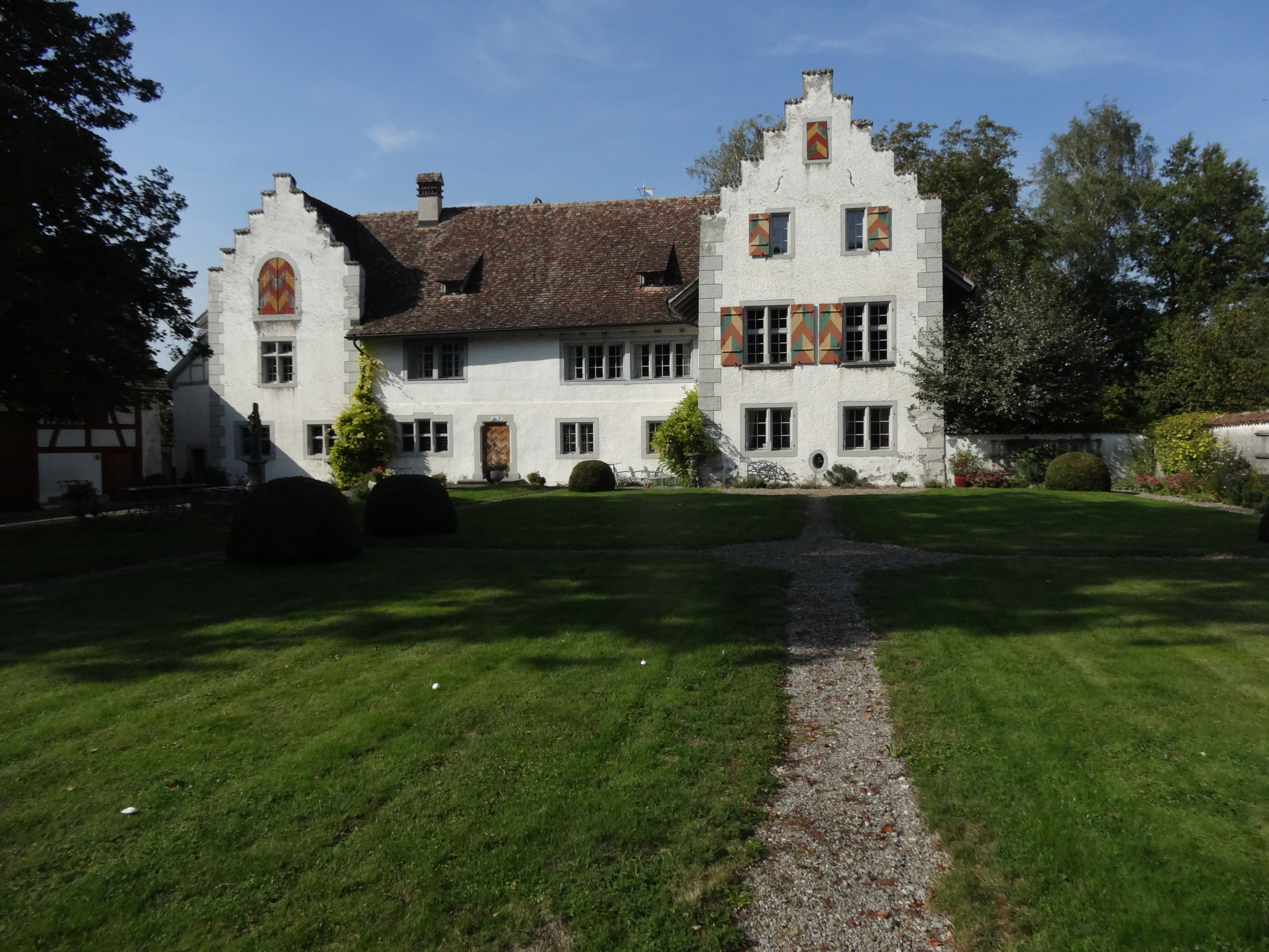 Der älteste Teil des Schlosses stammt aus den Jahren 1520. Es folgten zwei Erweiterungen in den Jahren 1570 und 1612.